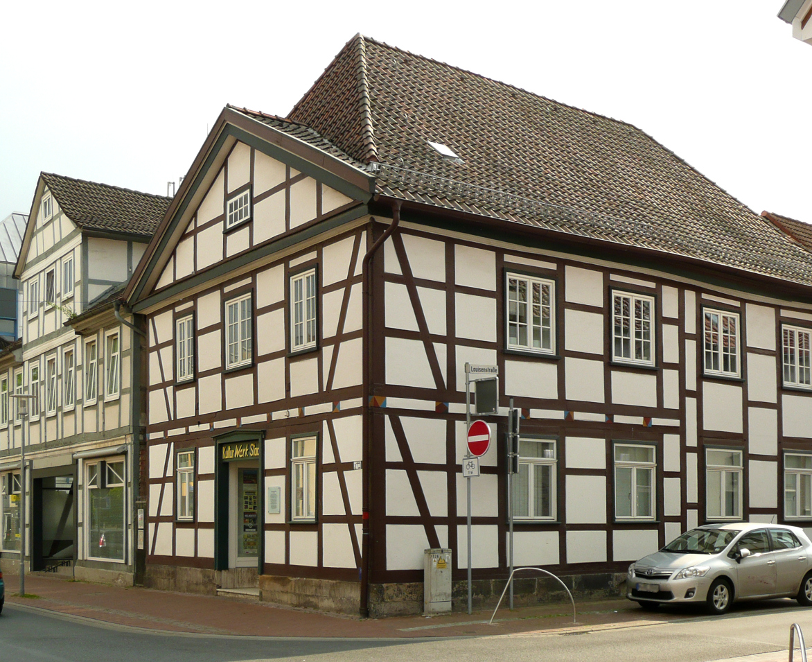 Frühere Synagoge in Burgdorf, 1811 als Synagoge erbaut